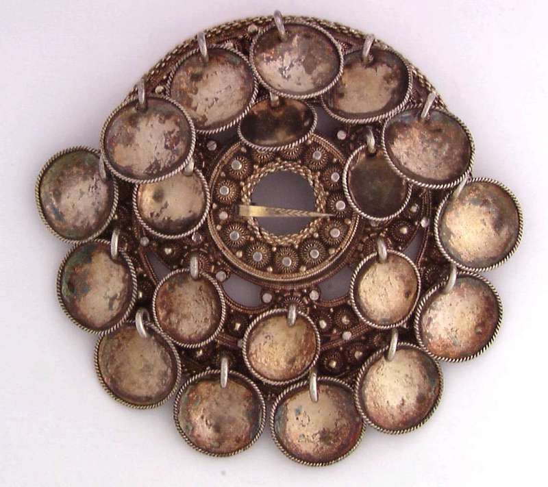 Slangesølje fra Telemark, forgylt sølv med filigran og hengende skåler. Foto Anne-Lise Reinsfelt / Norsk Folkemuseum, NF.1994-0297.